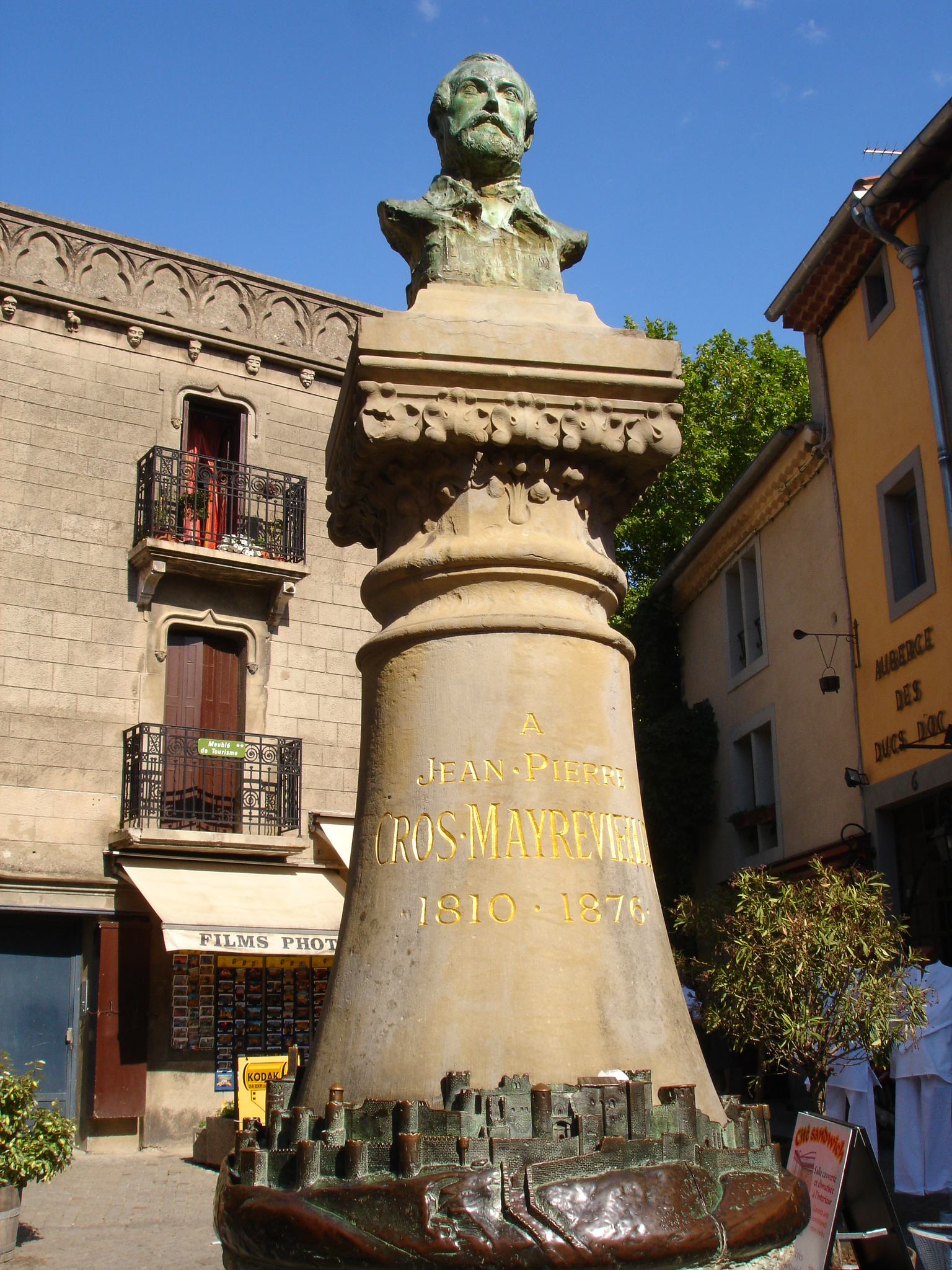 France, Aude (11), Carcassonne, buste de Jean-Pierre Cros-Mayrevieille